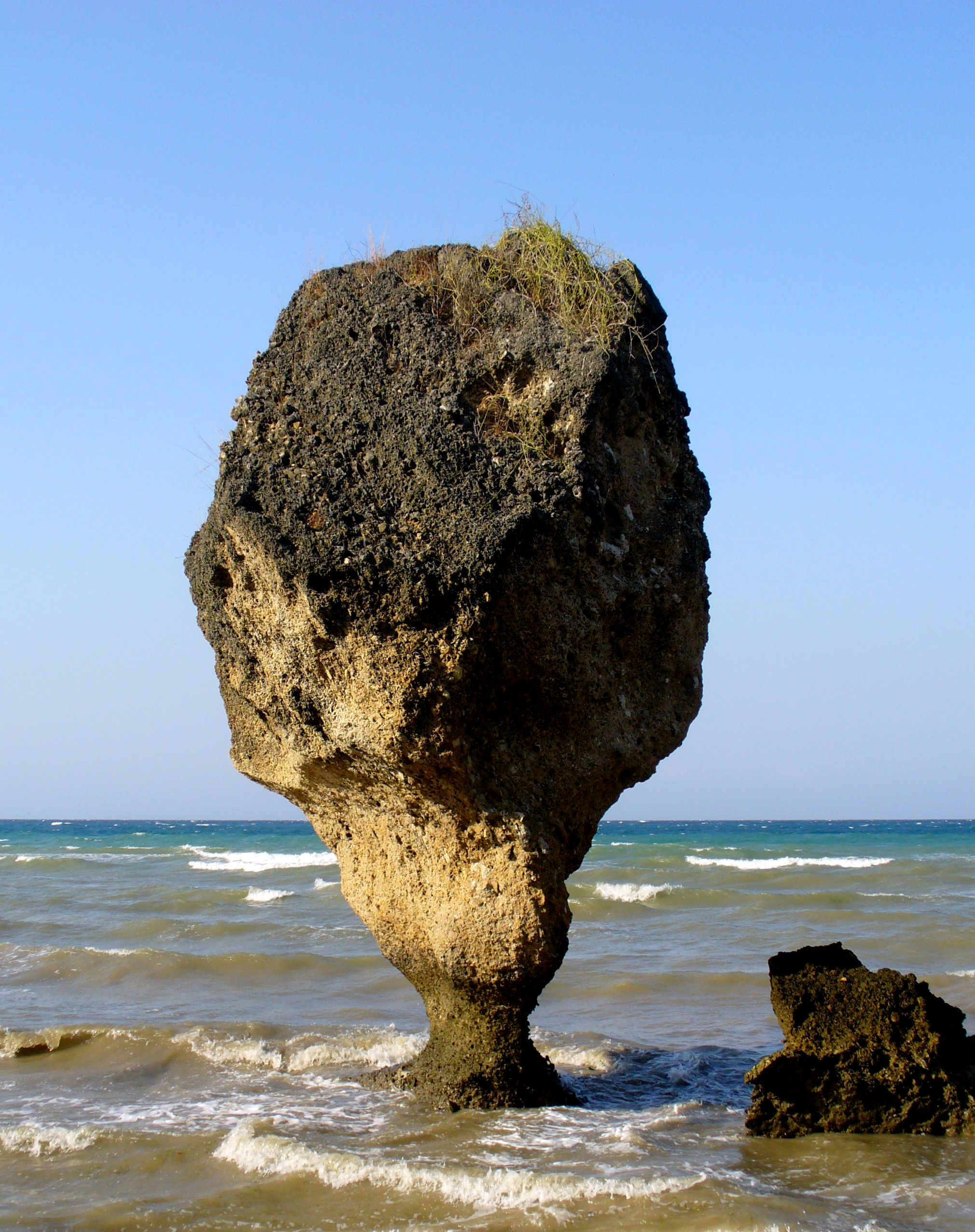 Pantai Wataboo, Osolata, East Timor